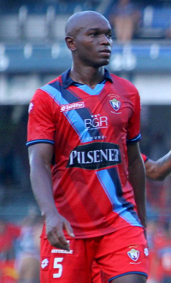 Guayaquil, 03 may (Andes).-Jugadores de El Nacional abandonan el campo de juego luego de caer 0x2 ante Emelec en el partido por la décimo sexta fecha del campeonato nacional de fútbol Foto:César Muñoz/Andes